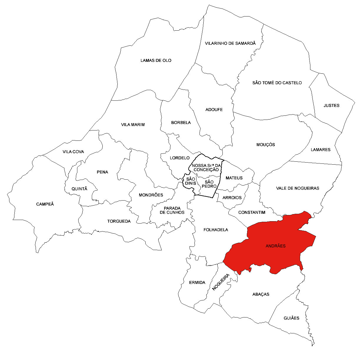 Freguesia de Andrães (concelho de Vila Real)